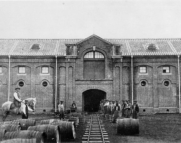 大正2年の醸造所